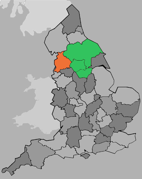 De graafschappen Lancashire en Yorkshire in England